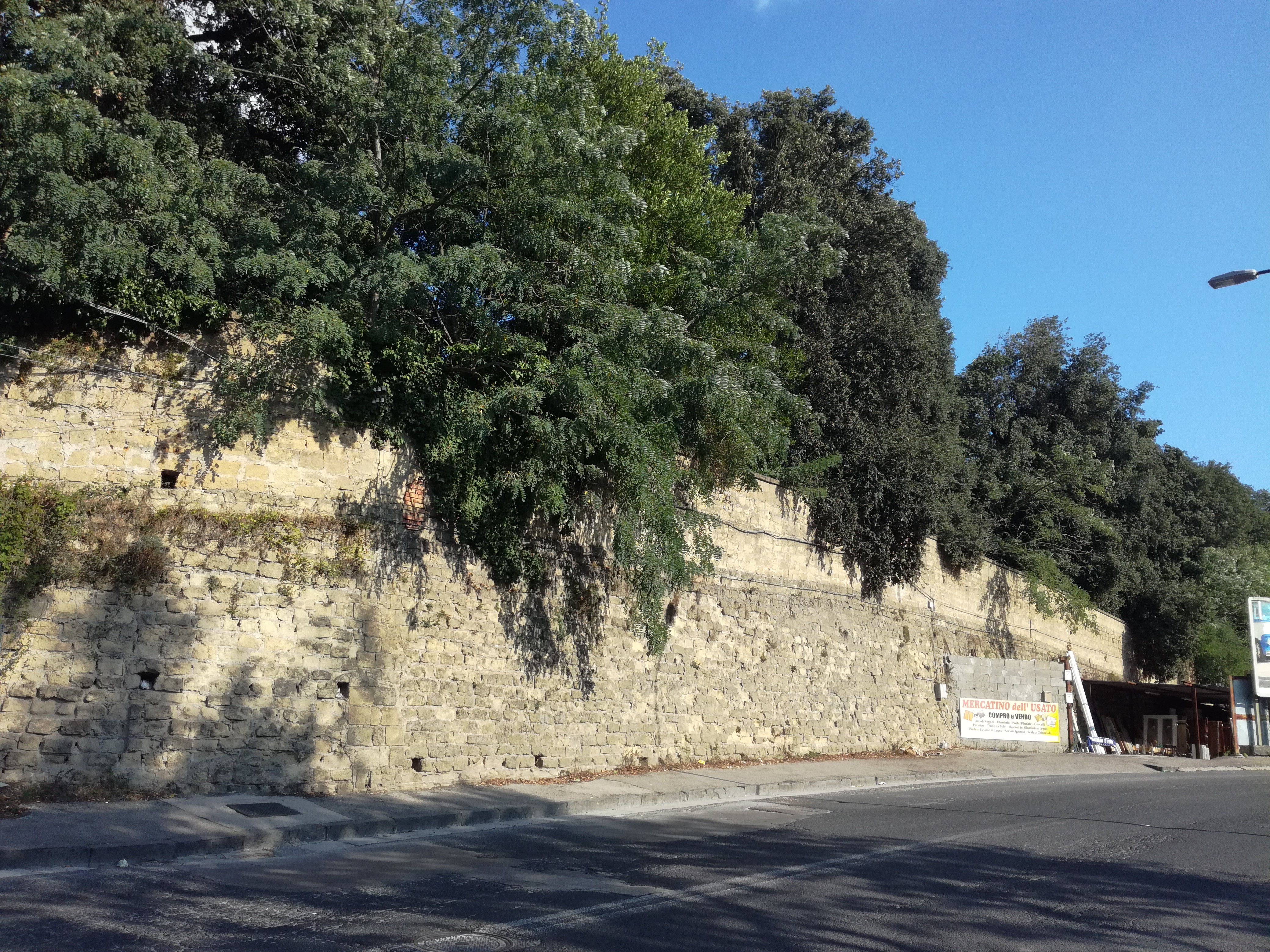 Mura del Finanziere